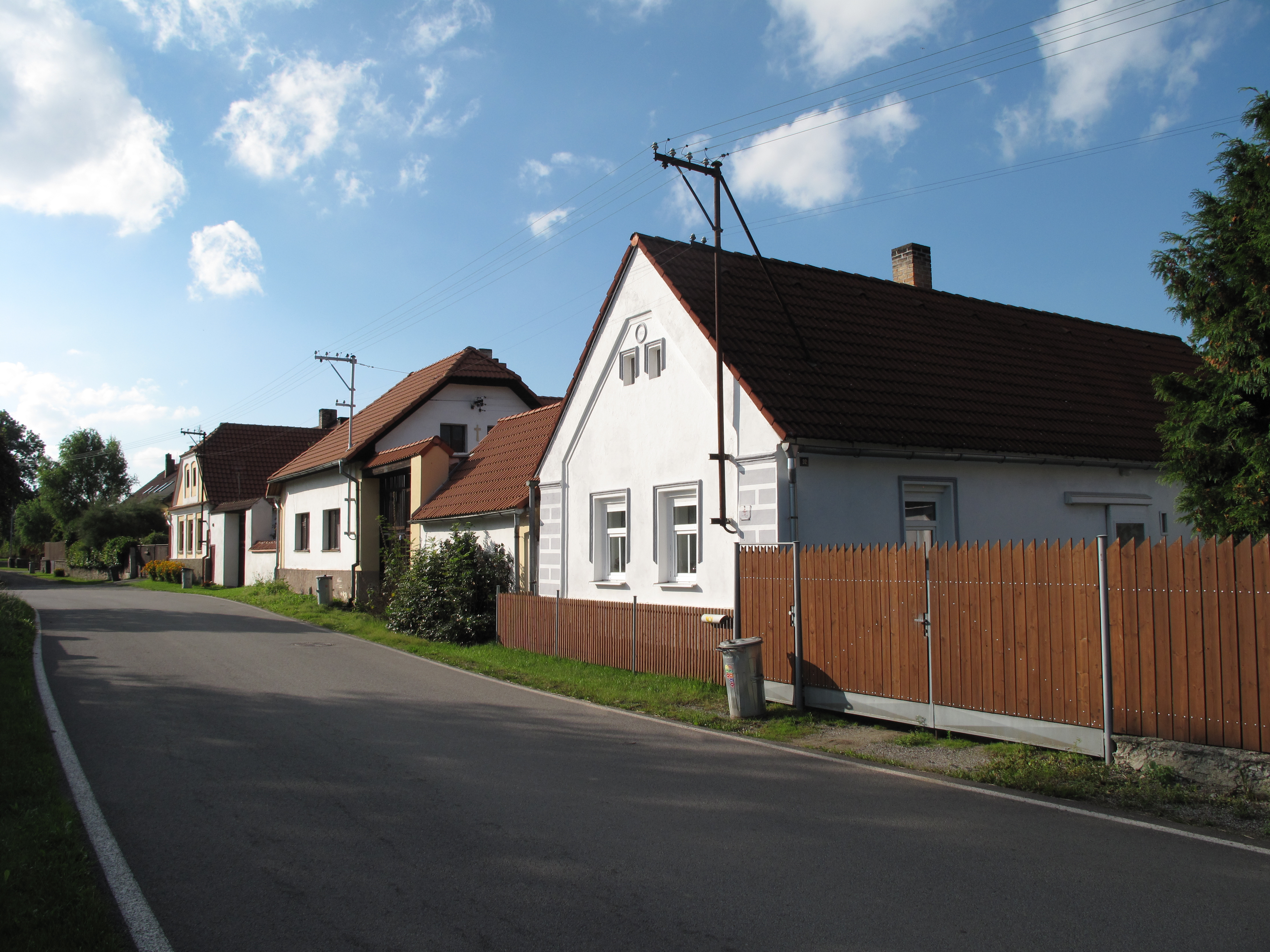 Domy u silnice v Mužeticích. Okres Strakonice, Česká republika.